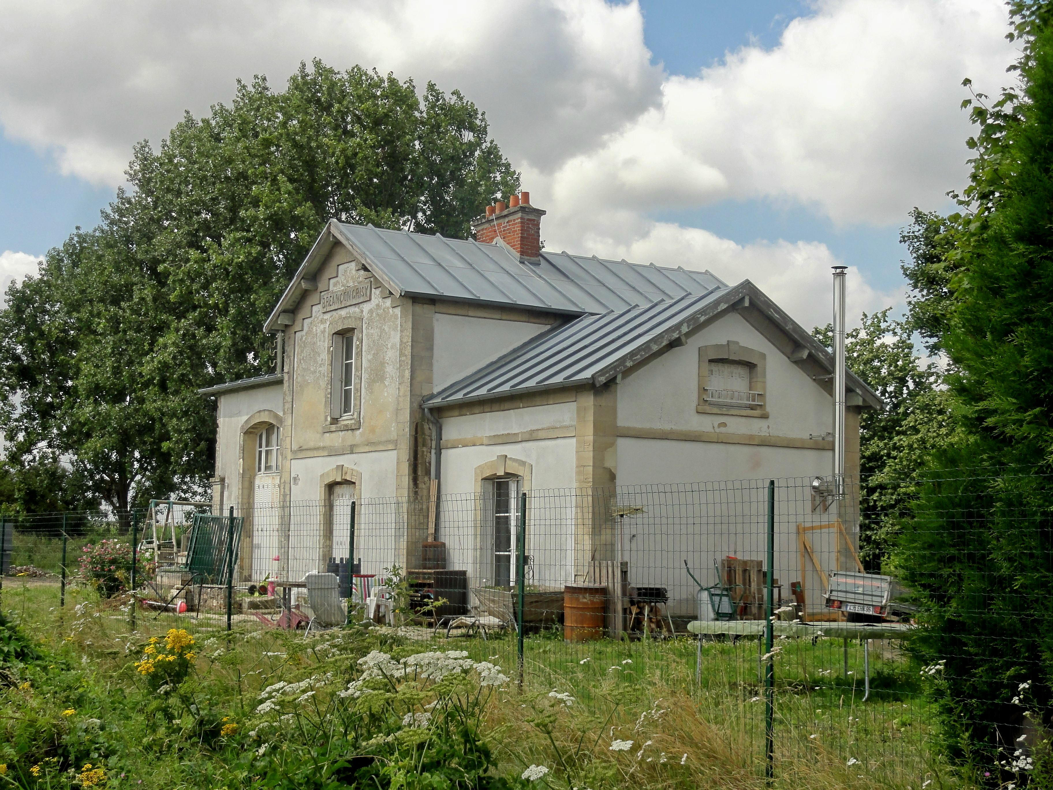 Ancienne gare de Bréançon - Grisy, côté voies, vue en diretion de Marines.